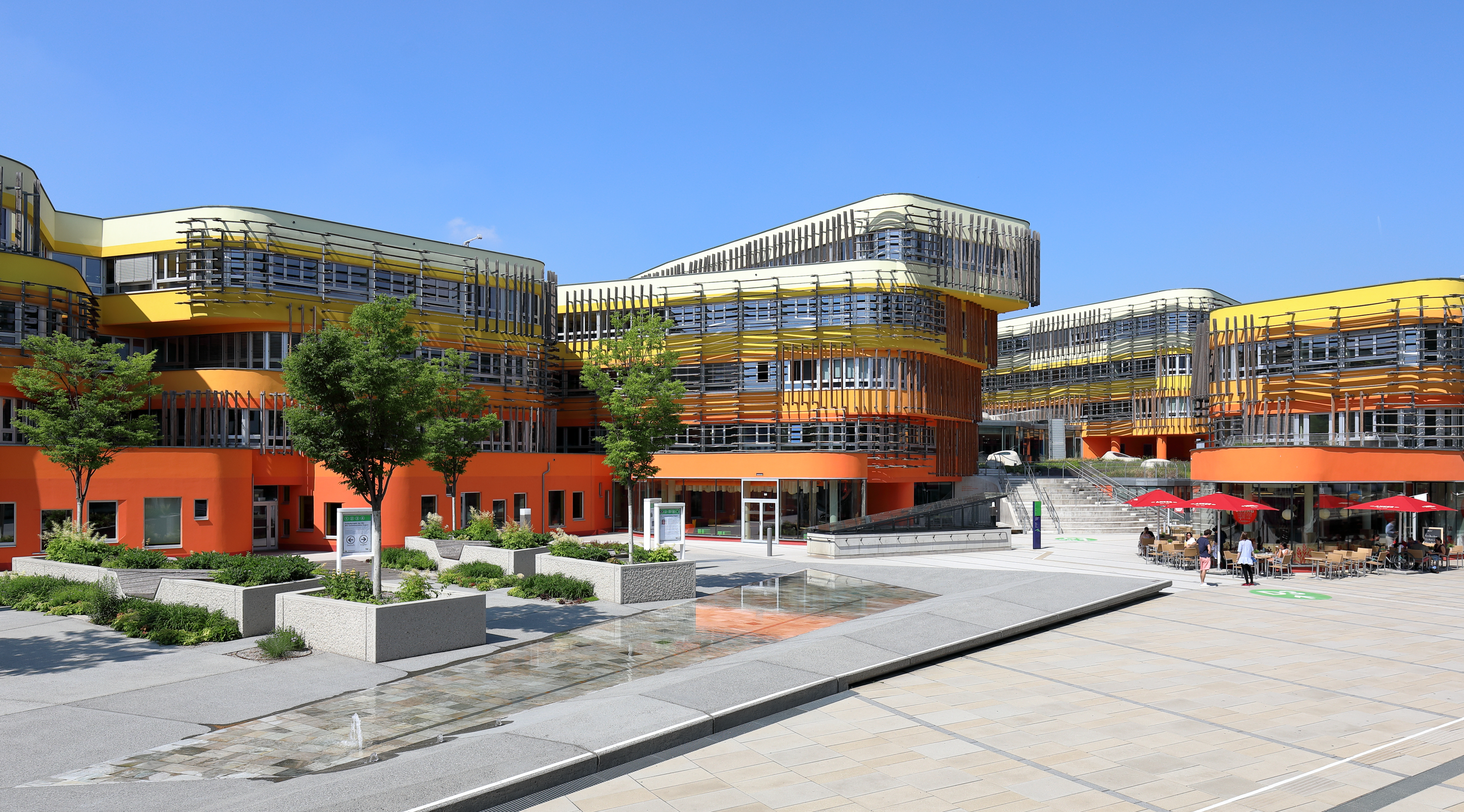 Das Department 3 (D3) und ganz rechts das Administration Department (AD) des WU Campus der Wirtschaftsuniversität im 2. Wiener Gemeindebezirk Leopoldstadt. Der Campus mit rund 35.000 m² verbauter Grundfläche und etwa 55.000 m² öffentlich zugänglicher Freifläche wurde von 2009 bis 2013 auf dem südwestlichen Teil des einstigen Weltausstellungs- und späteren Messegeländes am Nordostrand des Wiener Praters um rund eine halbe Milliarde Euro errichtet. D3 & AD plante das Architekturbüro Crab Studio aus London unter der Leitung von Peter Cook und Gavin Robotham.